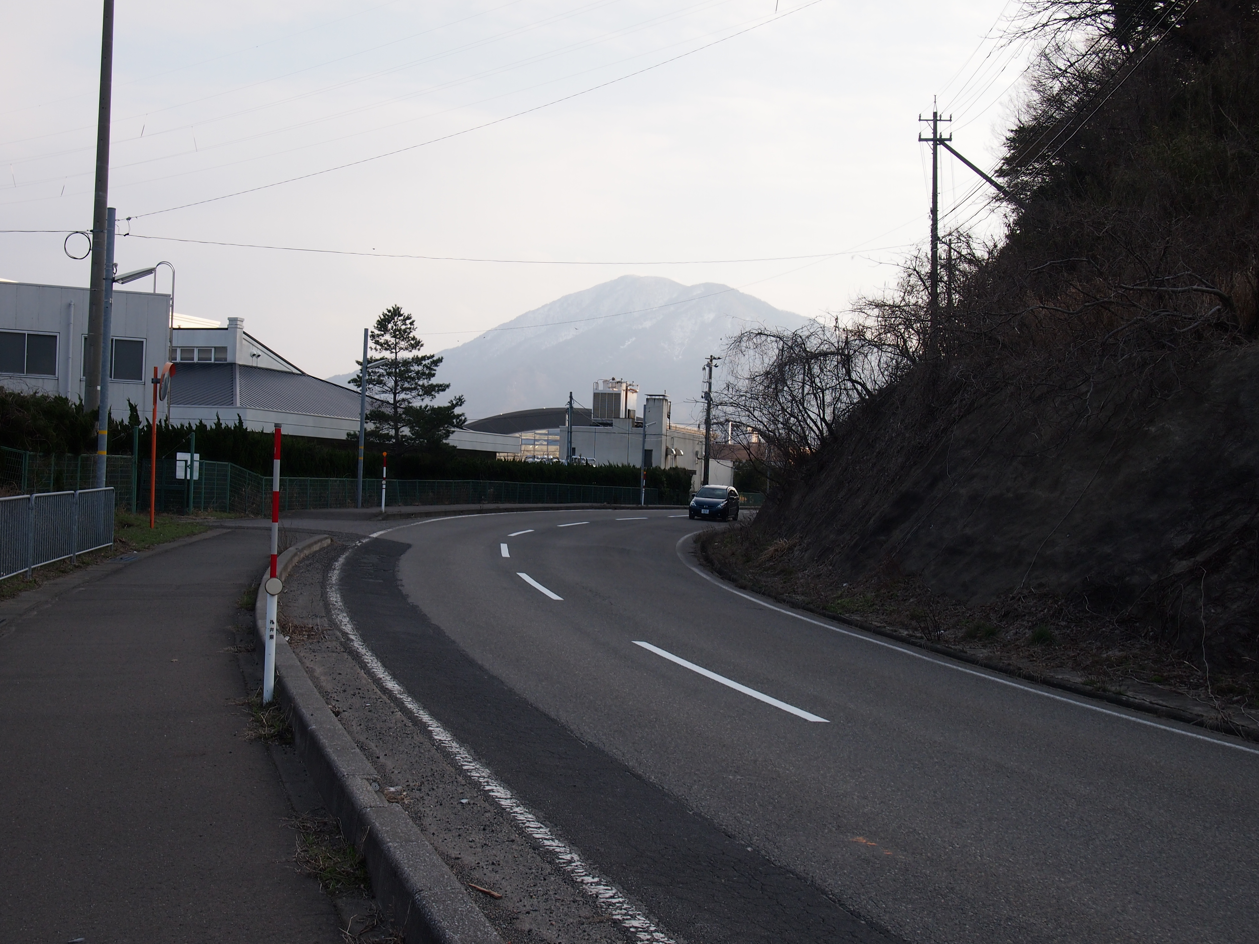 敦賀市馬坂峠、国土地理院の地形図上の峠付近。